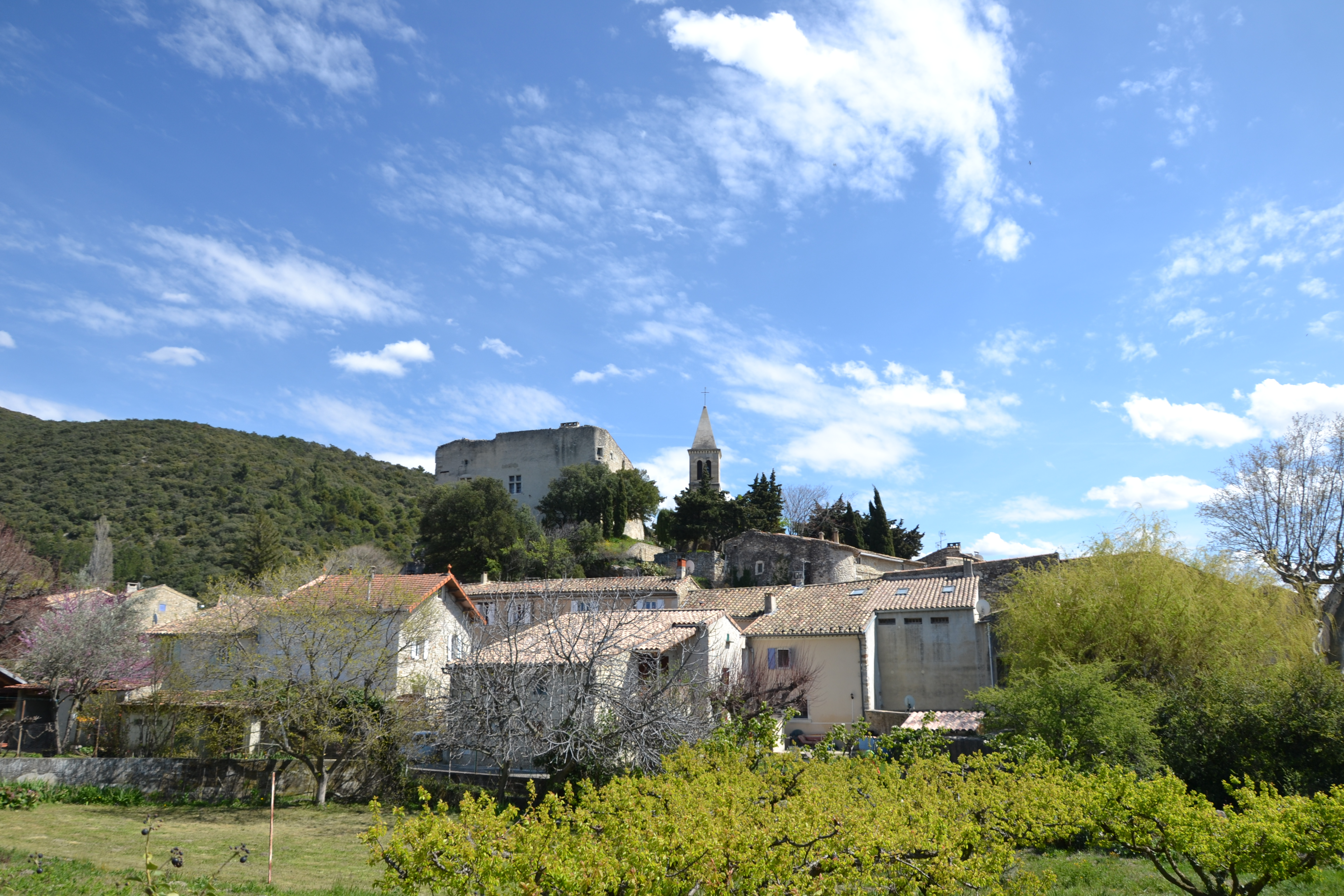 Village et château du Pègue